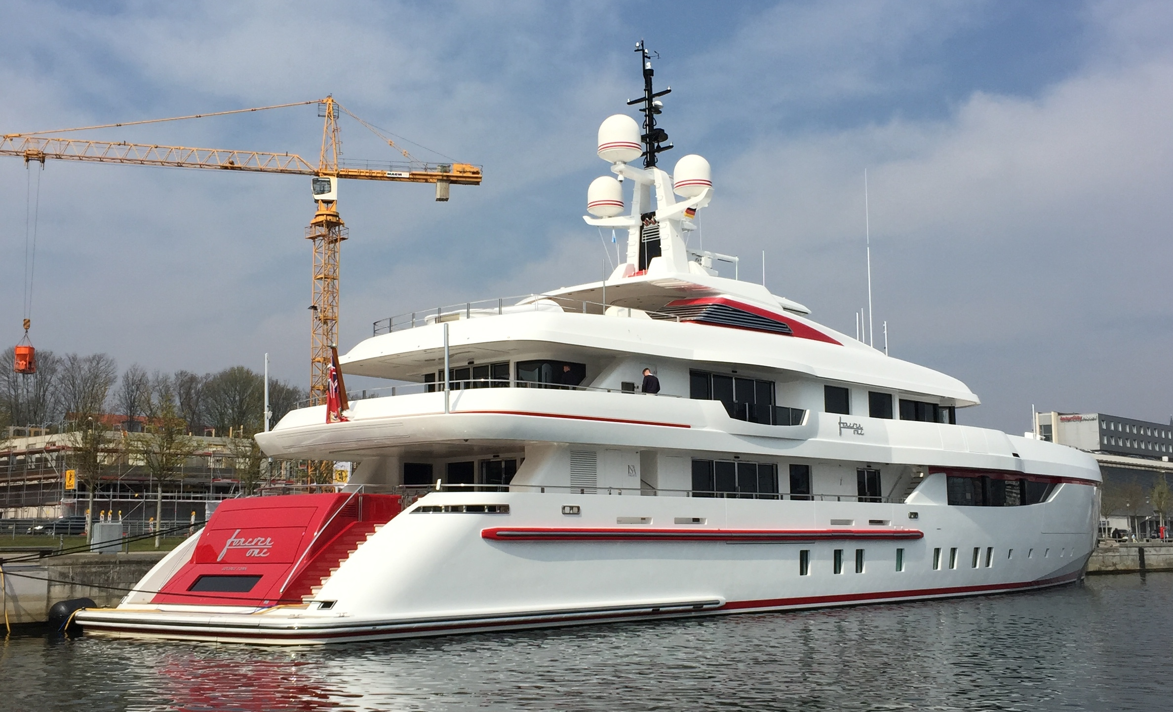 Motoryacht "Forever One" Seitenansicht